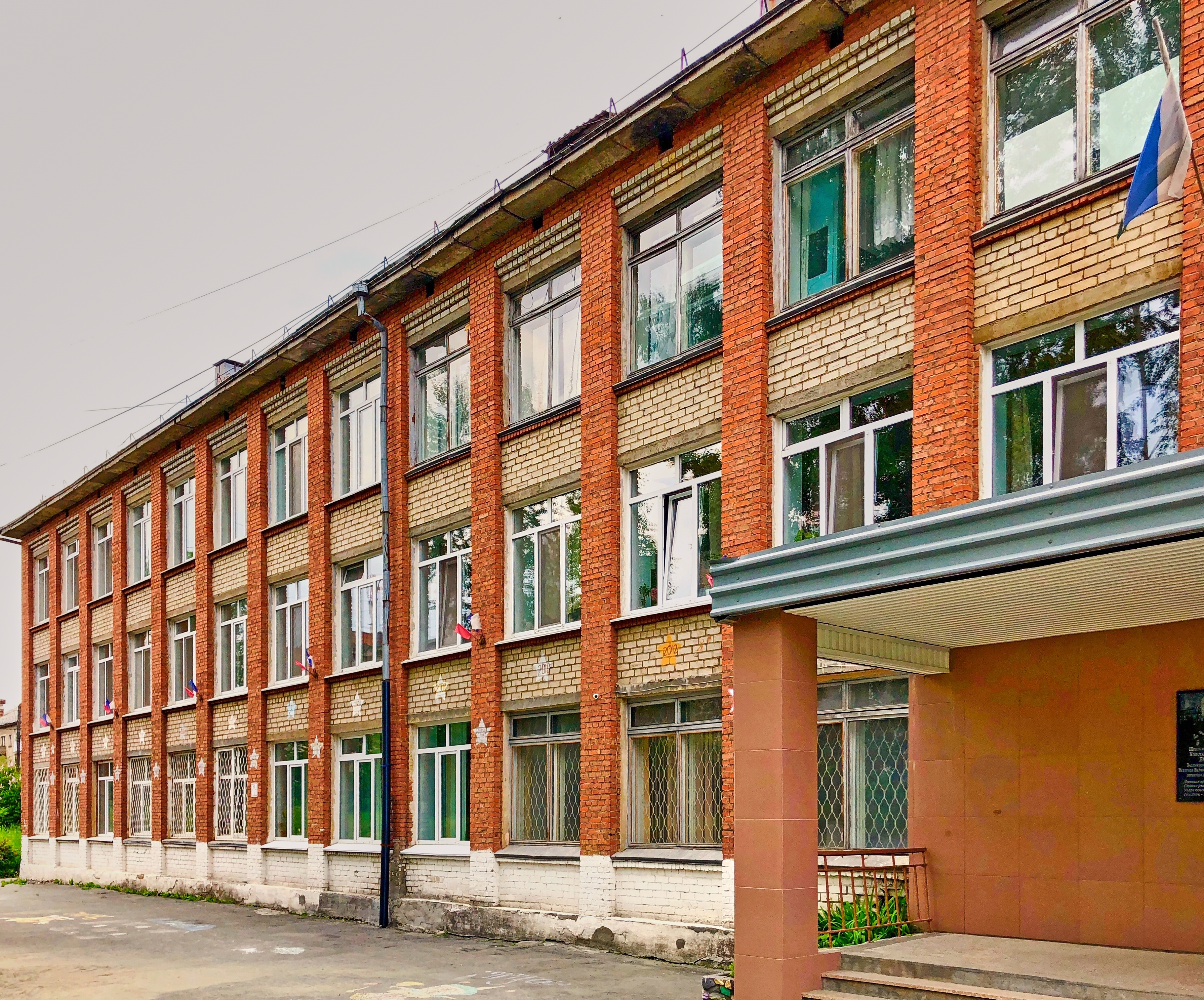 Школа им. К. Н. Новикова